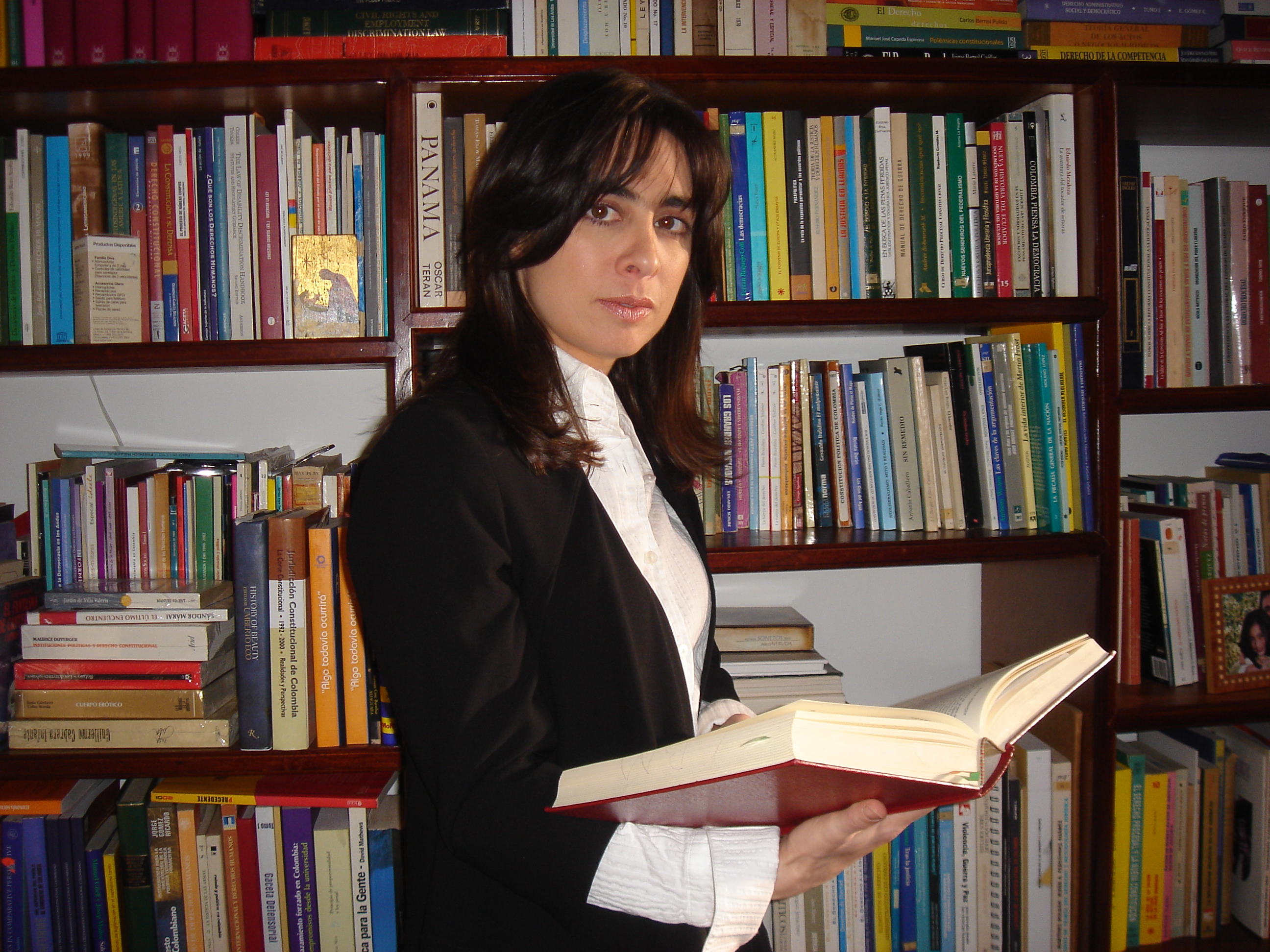 Relatora Especial para la Libertad de Expresión de la Comisión Interamericana de Derechos Humanos de la Organización de Estados Americanos